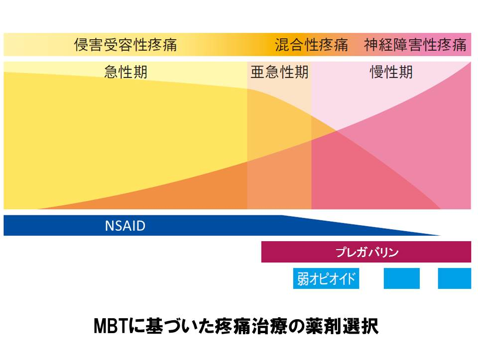 MBTに基づいた疼痛治療の薬剤選択